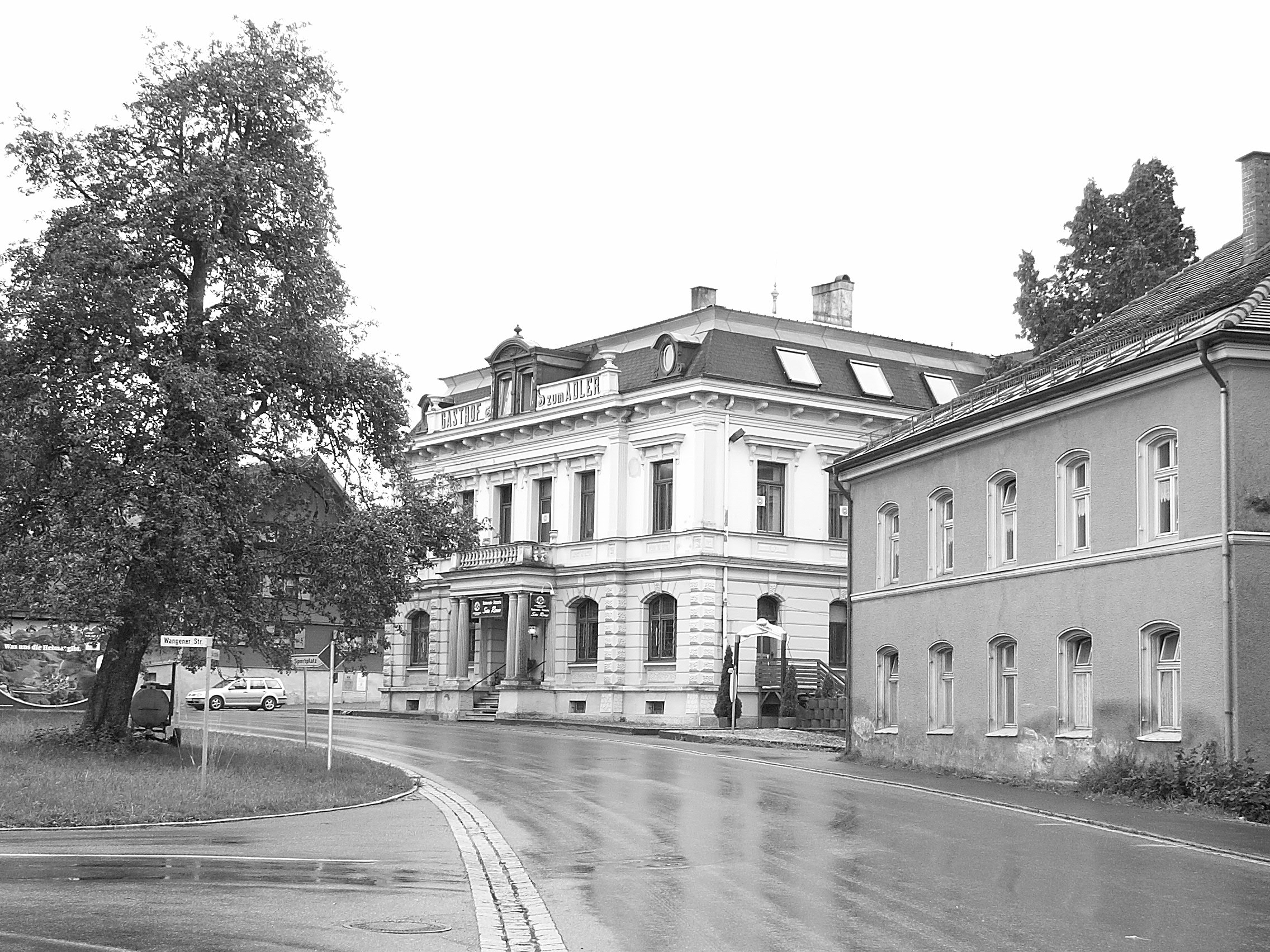 Salzstraße mit ehem. Gasthof Adler und Pfarrhaus in Wohmbrechts, Hergatz